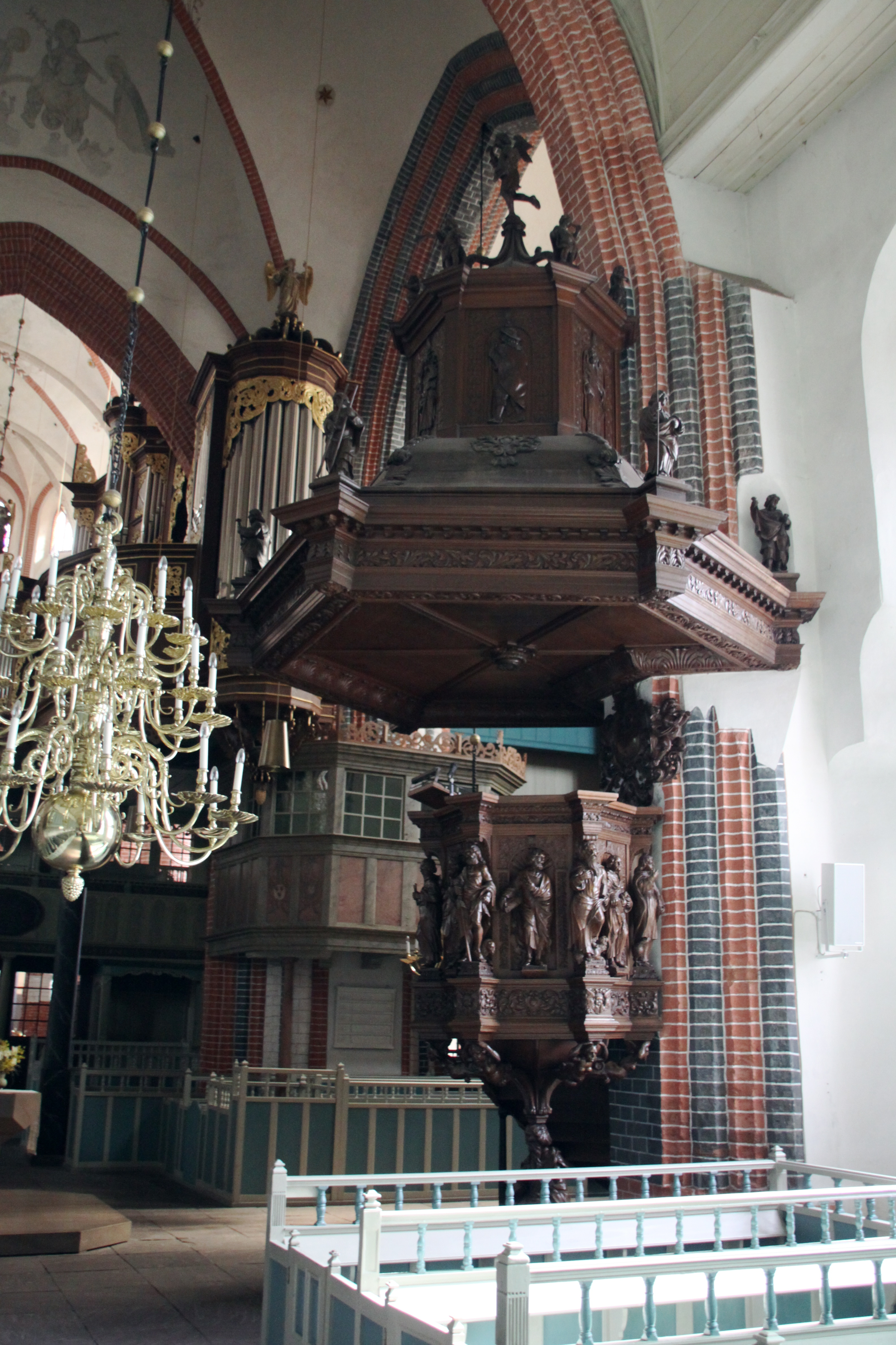 Ludgerikirche Kanzel